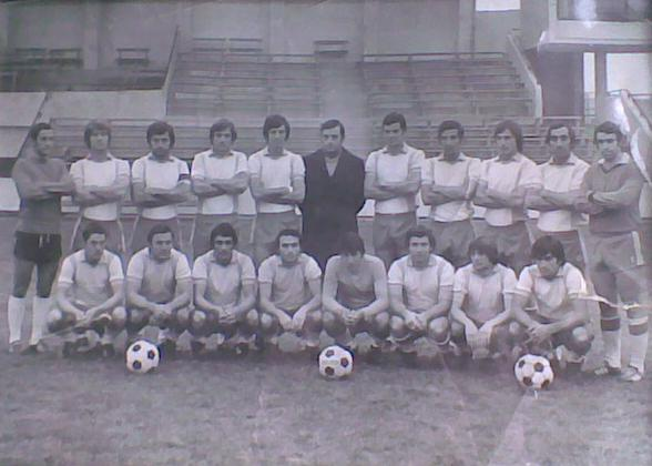 Арда през 70-те